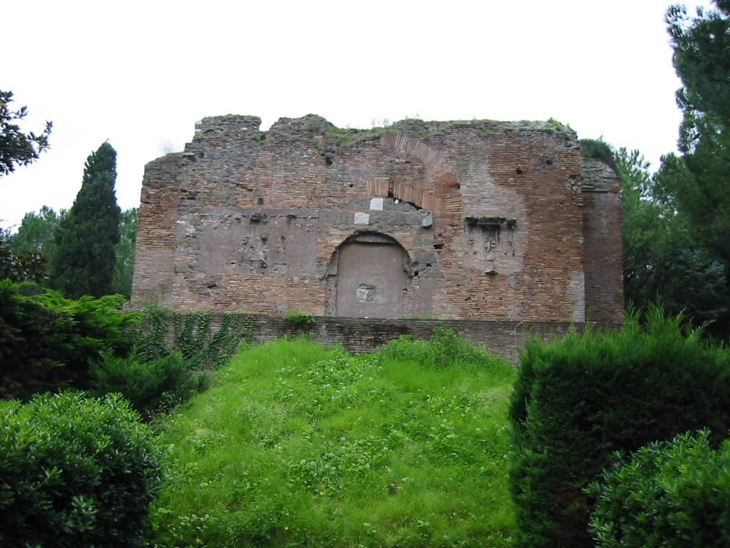 Mausoleo di St Urbano Martire